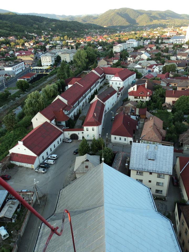 Fosta Monetărie, azi Muzeul Județean de Istorie și Arheologie Maramureș